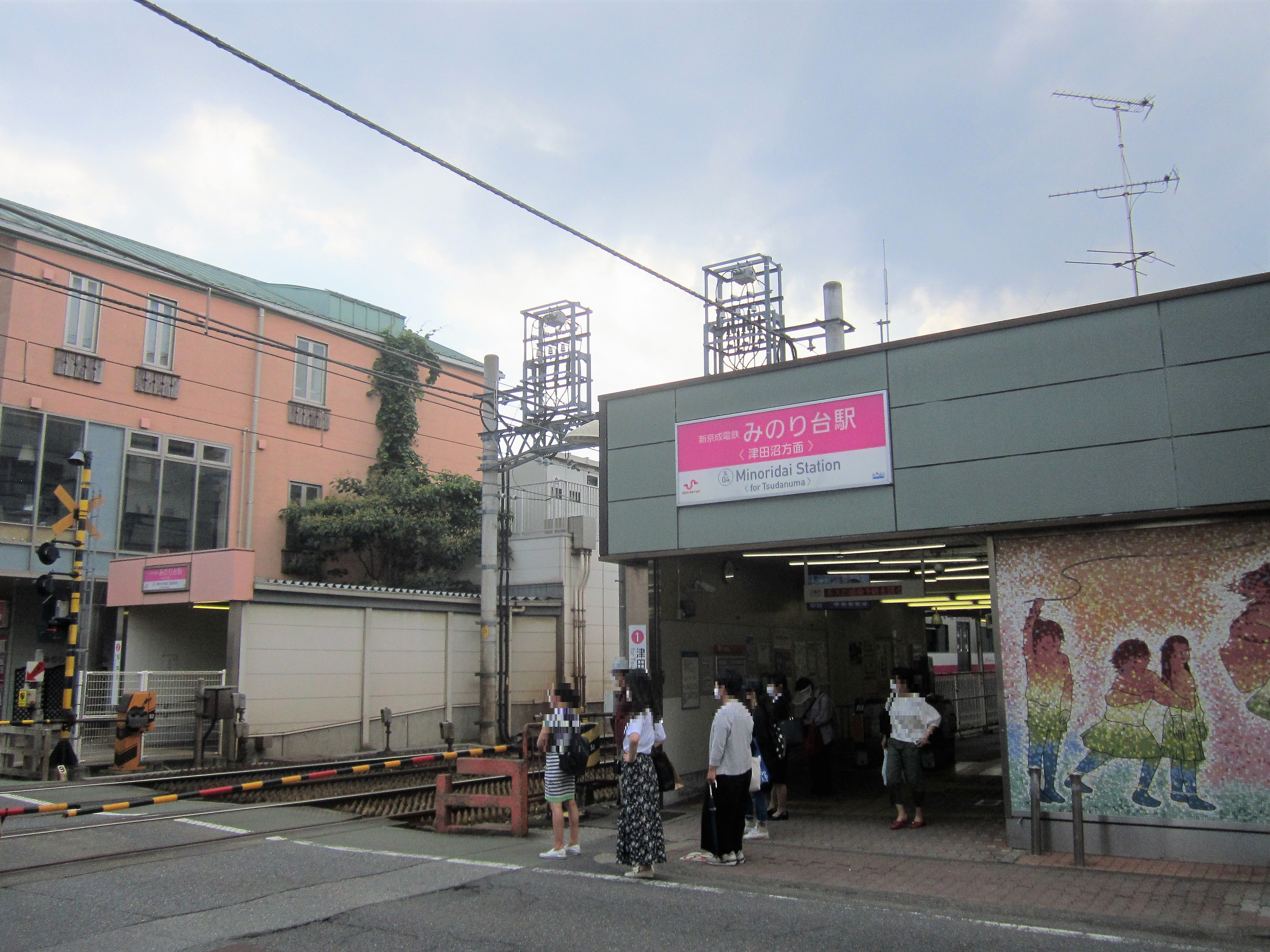 みのり台駅（2020年6月） Canon PowerShot A2200